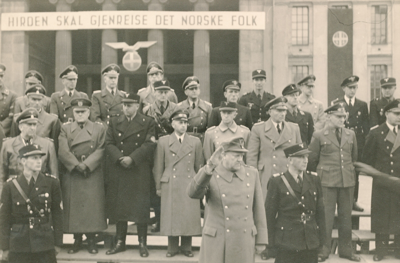 Ukjent datering. RA/PA-0748/Fc/0001 (1133)